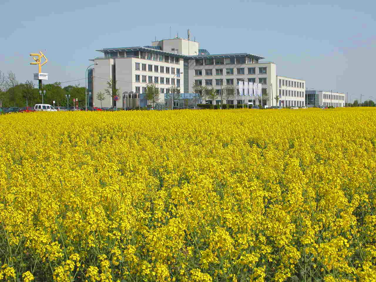 MITGAS-Hauptverwaltung mit Rapsfeld in Kabelsketal/ OT Gröbers